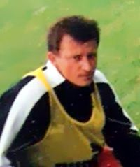 Dorinel Munteanu im Trainingsgelände Köln. Crop of this image.